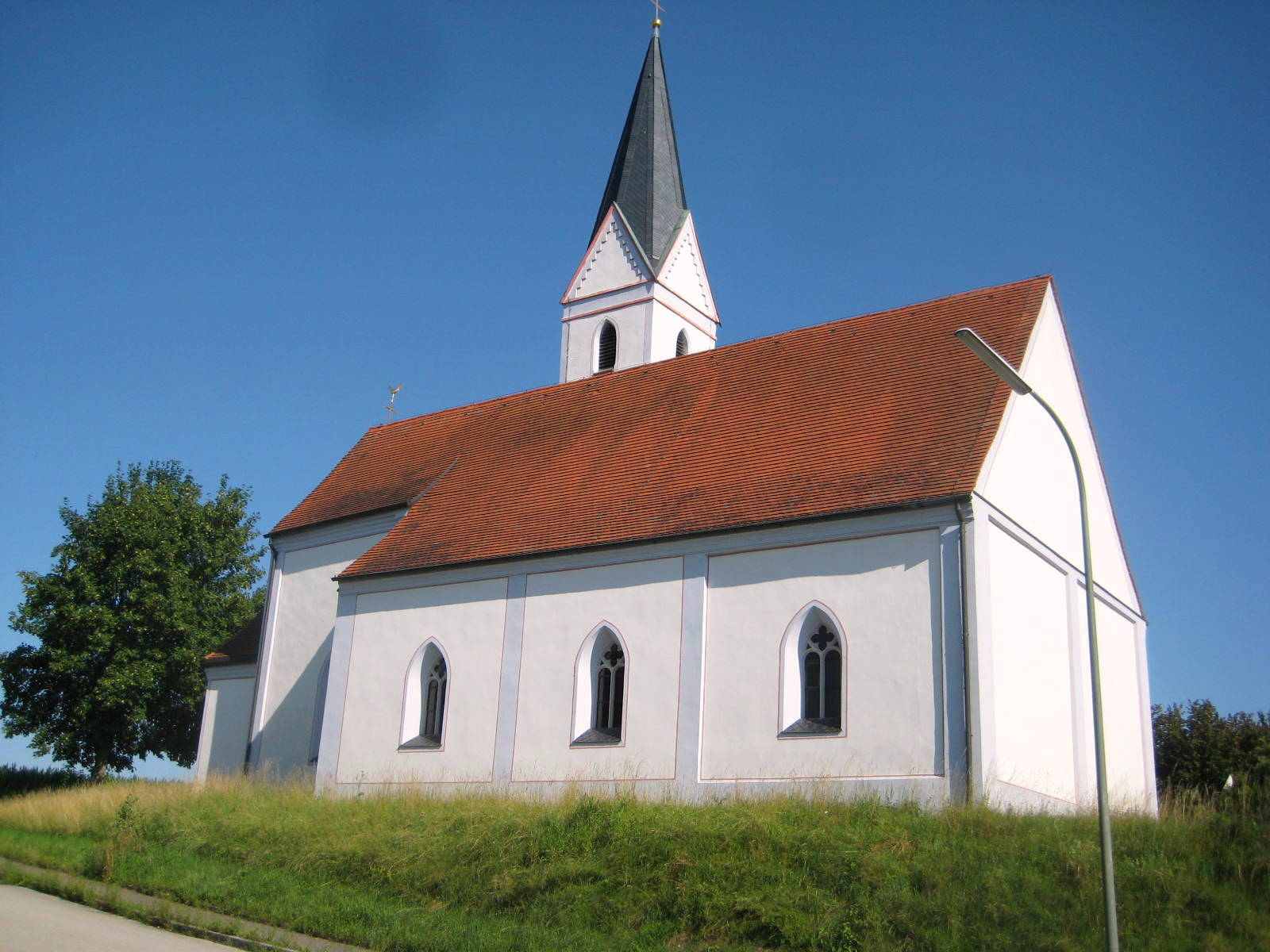 Landkreis Freising, Langenbach, Kath. Wallfahrtskirche Maria Rast